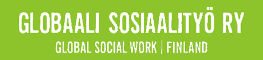 Yhdistyksen logo